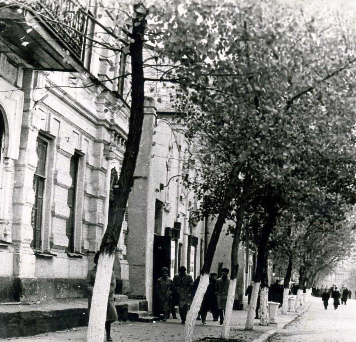 Здание библиотеки по ул. Ленина, 34.